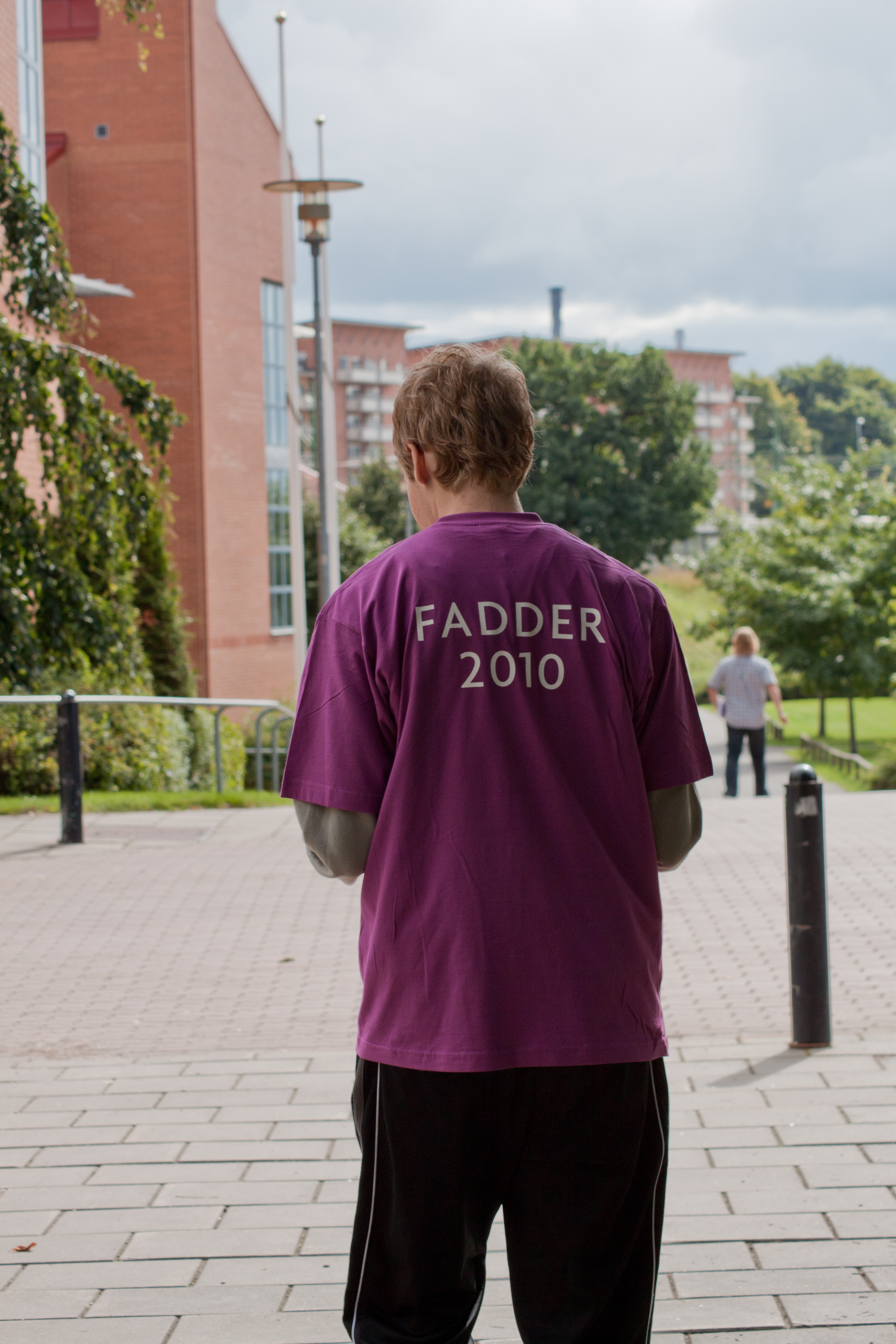 En fadder vid högskolan i skövde. Höstterminen 2010.